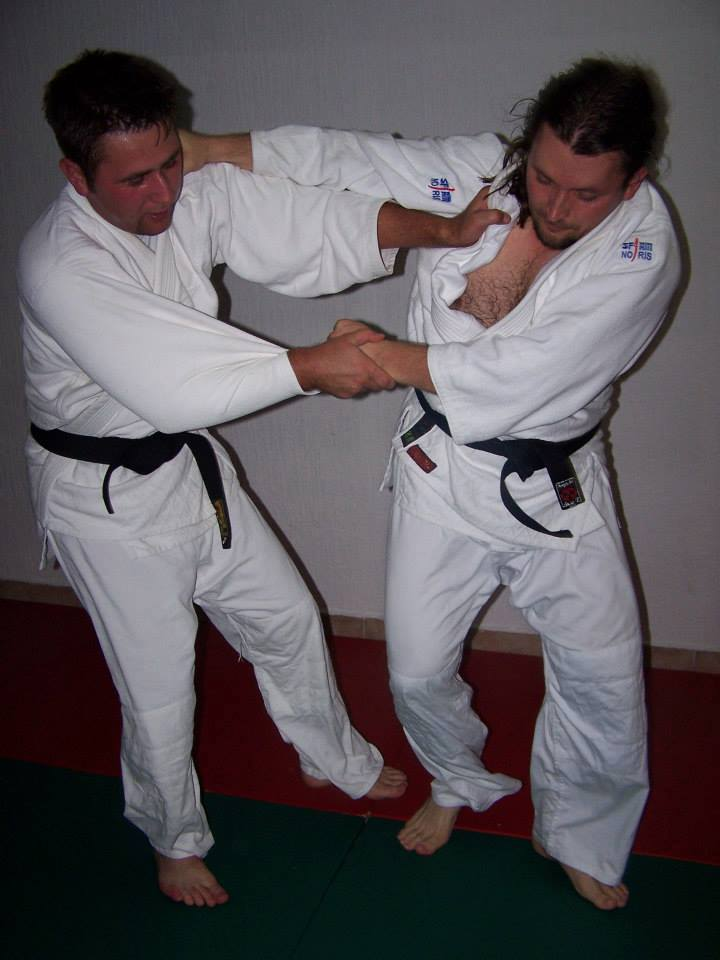 Давид Кулишић и Бранислав Лукић Лука су оснивачи SEF Society (СЕФ Академија) и Society of Traditional Japanese Culture "Aikikai" in Bosnia and Herzegovina. Један од оснивача Џудо клуба Гард Лукавац.